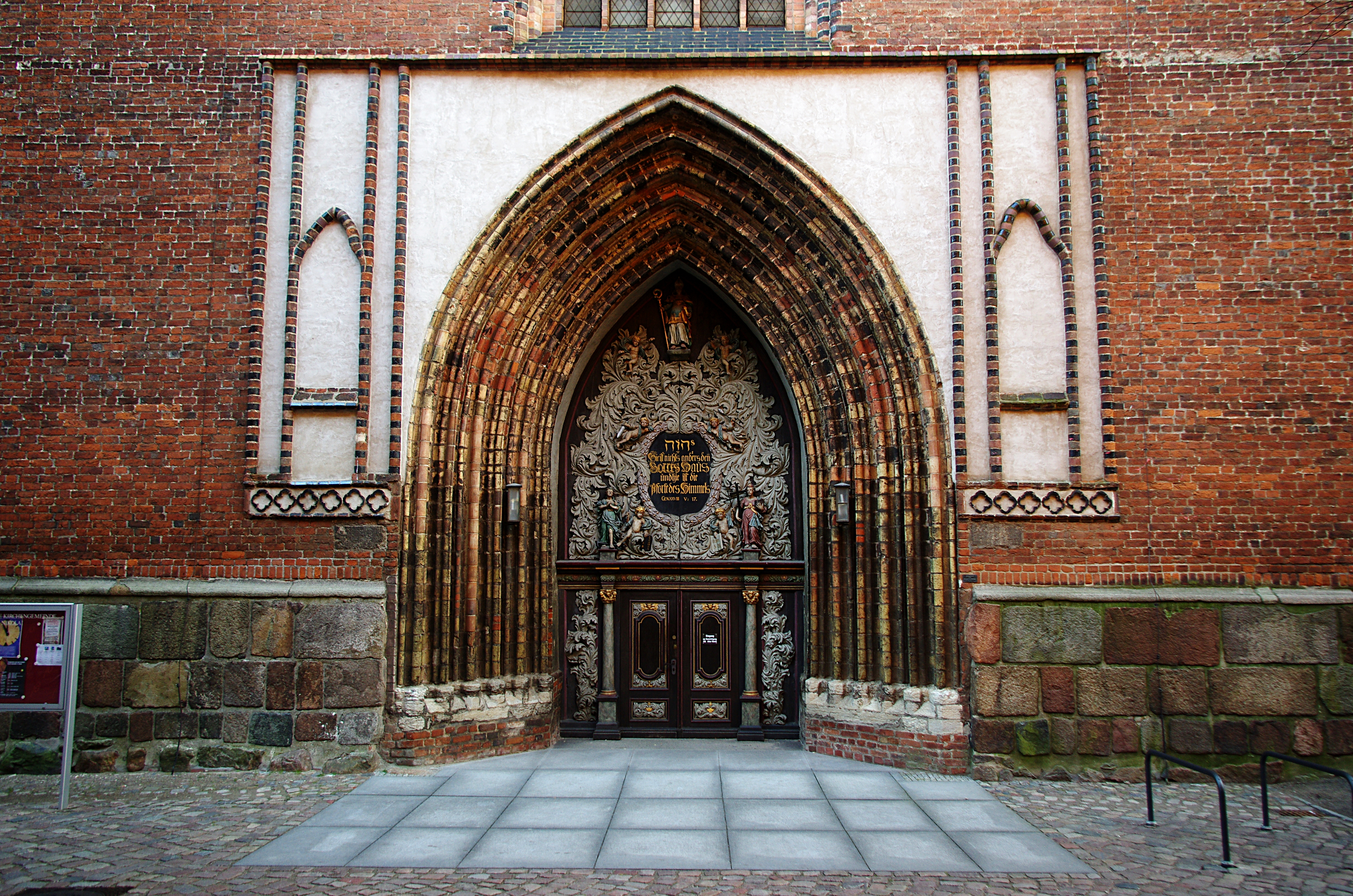 Stralsund in Mecklenburg-Vorpommern. Das Portal der Kirche St. Nikolai in Stralsund in Richtung Rathaus.